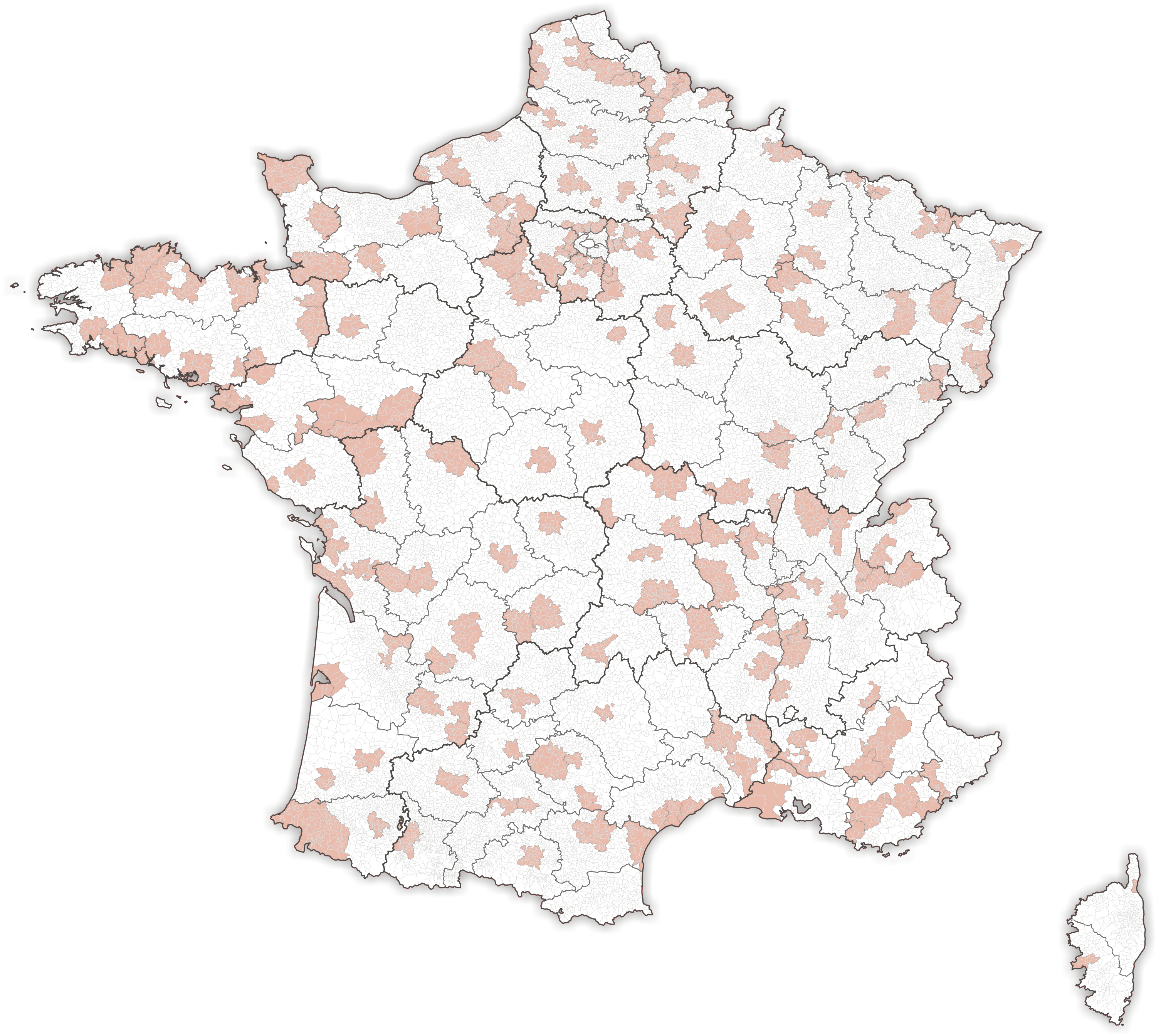 Communauté d’agglomérations in Frankreich